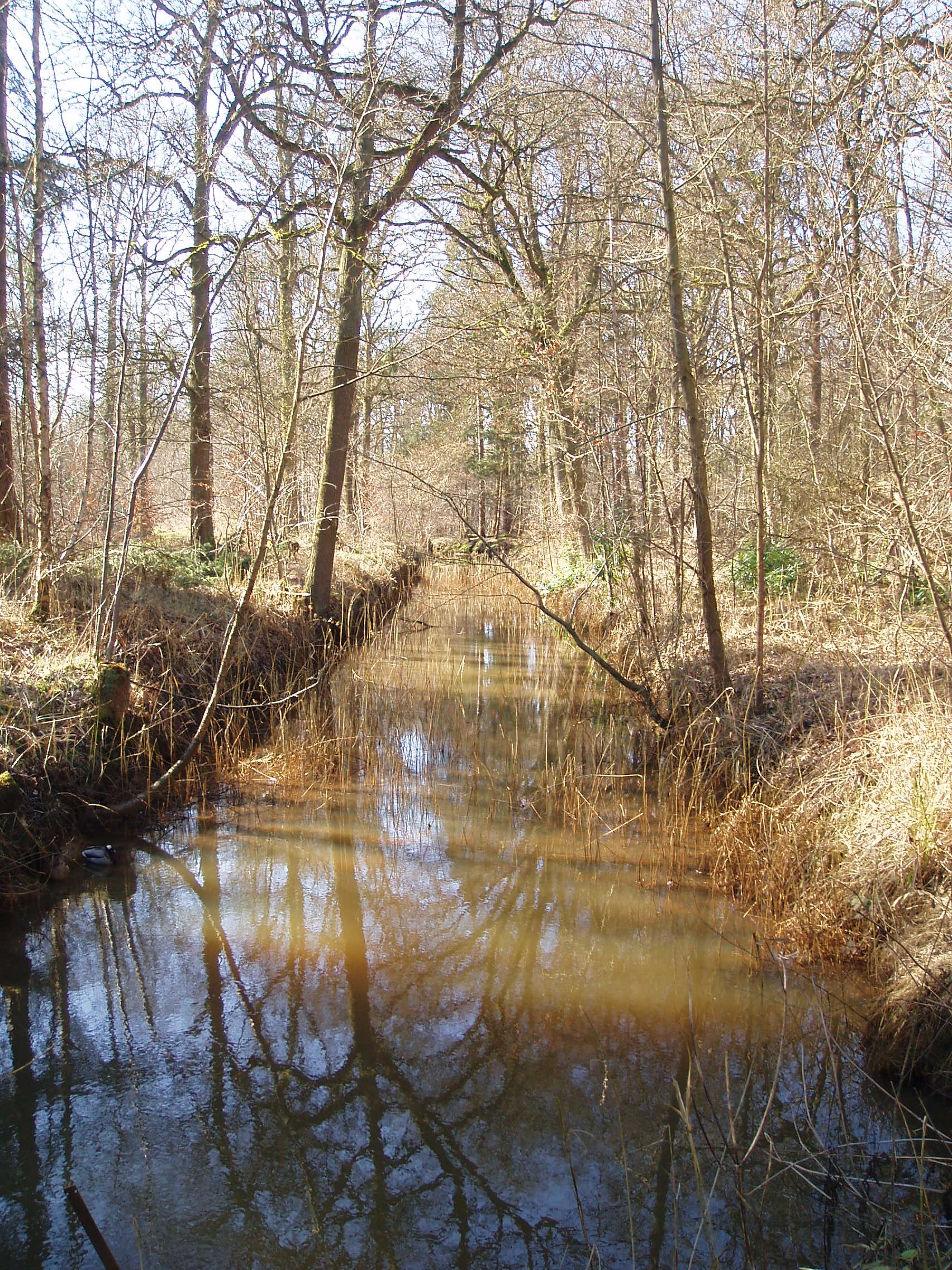 Heidebeek te Oelegem